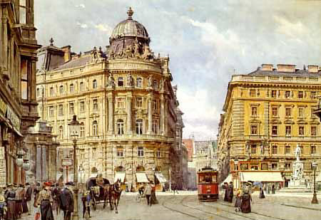 Wien, Albertinaplatz mit Philiphof